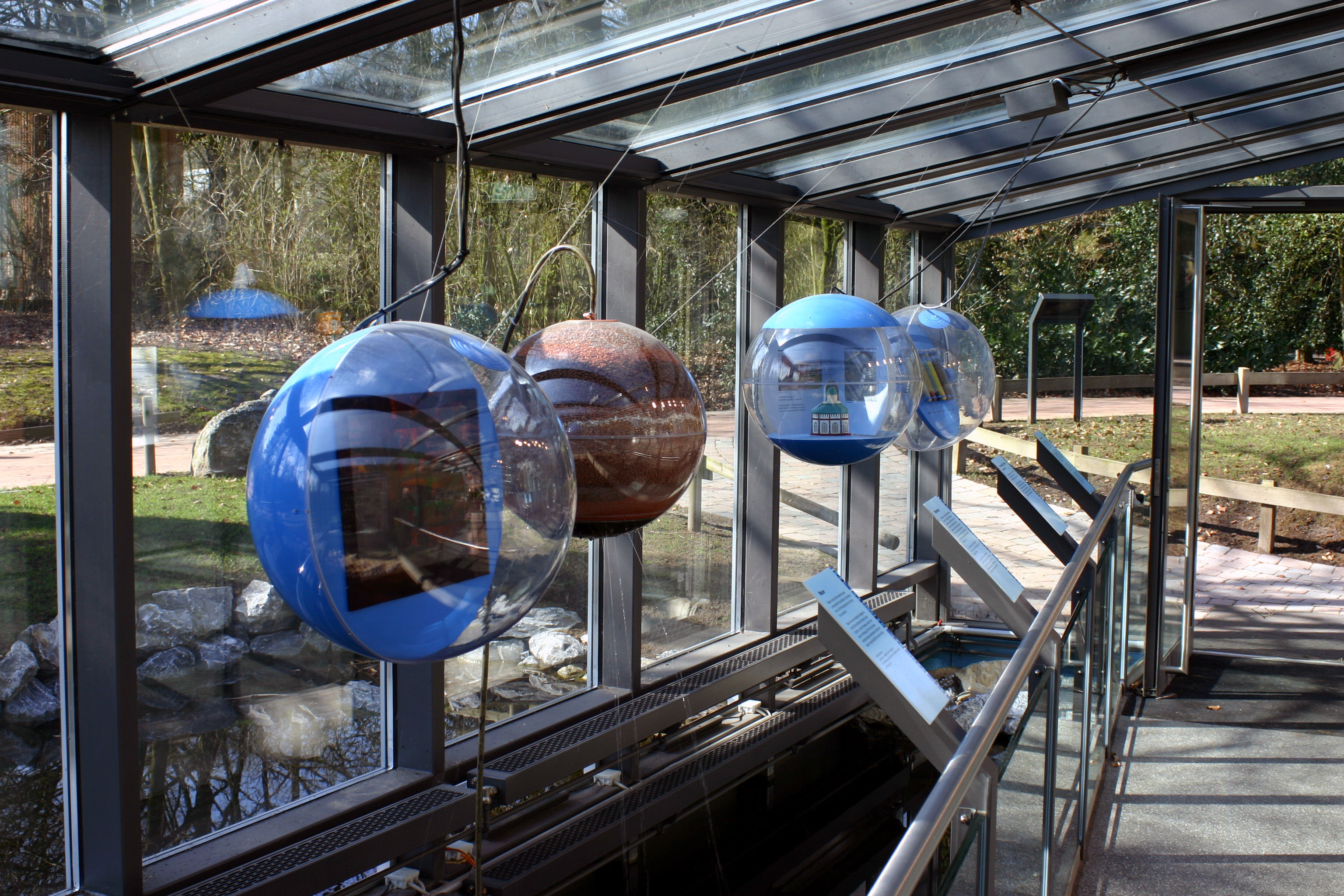 BiOCity: Centrum zur Erforschung der Biodiversität